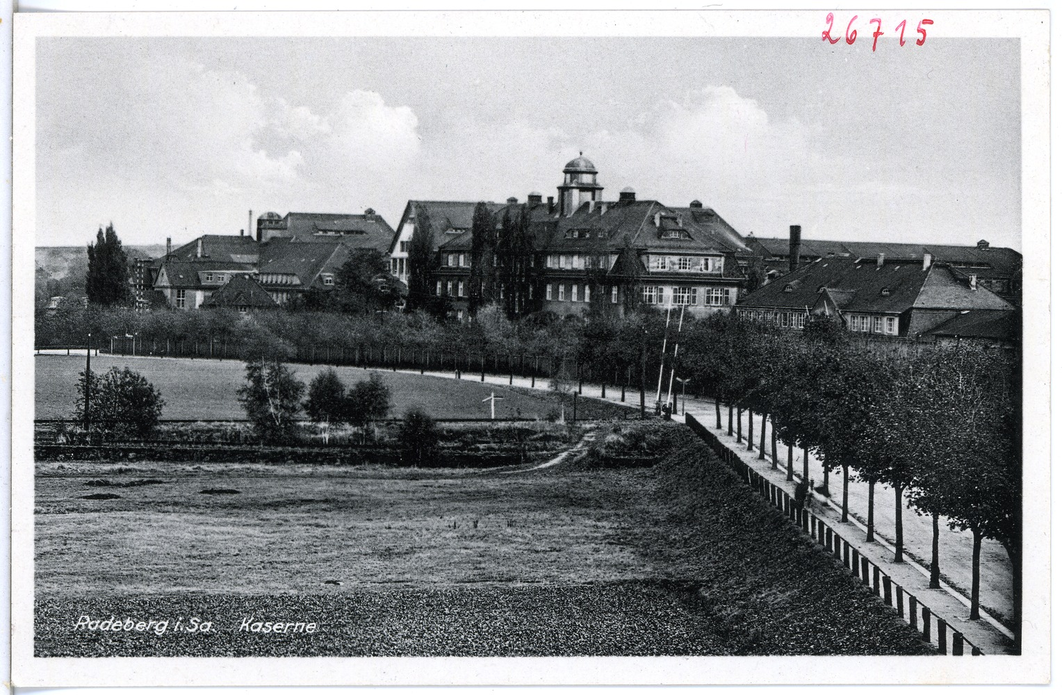 Radeberg; Kaserne This postcard is from publisher Brück & Sohn in Meißen ( postcard has a unique number 26715 and is available in a higher resolution at the publisher. This images was uploaded in a cooperation project between Wikipedians and the publisher.